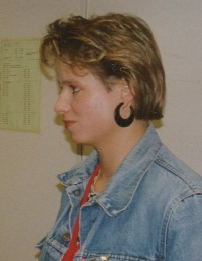 Porträt Jessica Schellack, Journalistin, Drehbuchautorin, Tochter von Jürgen Roland